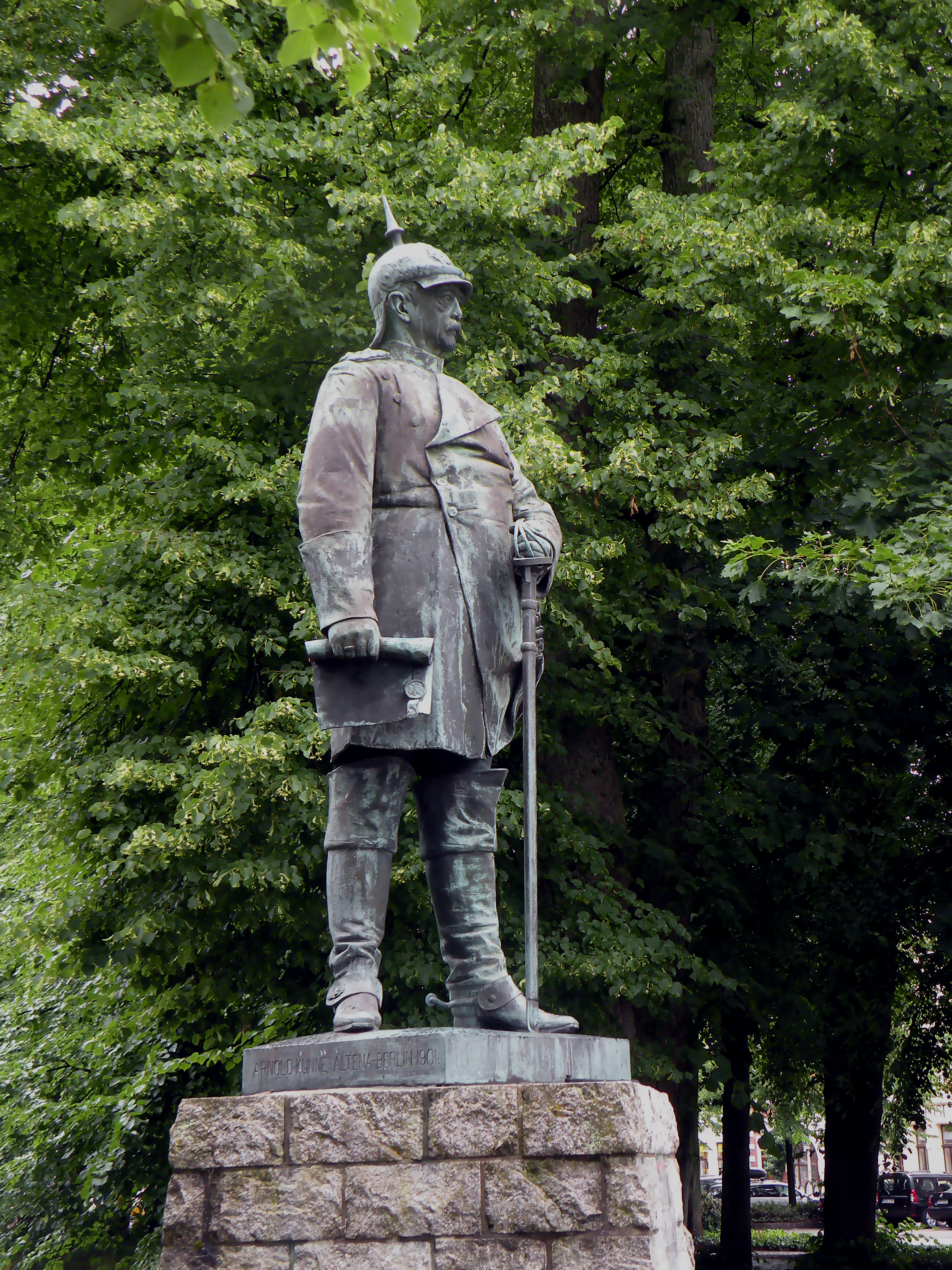 Bismarck monument. Norden.(Ostfriesland)